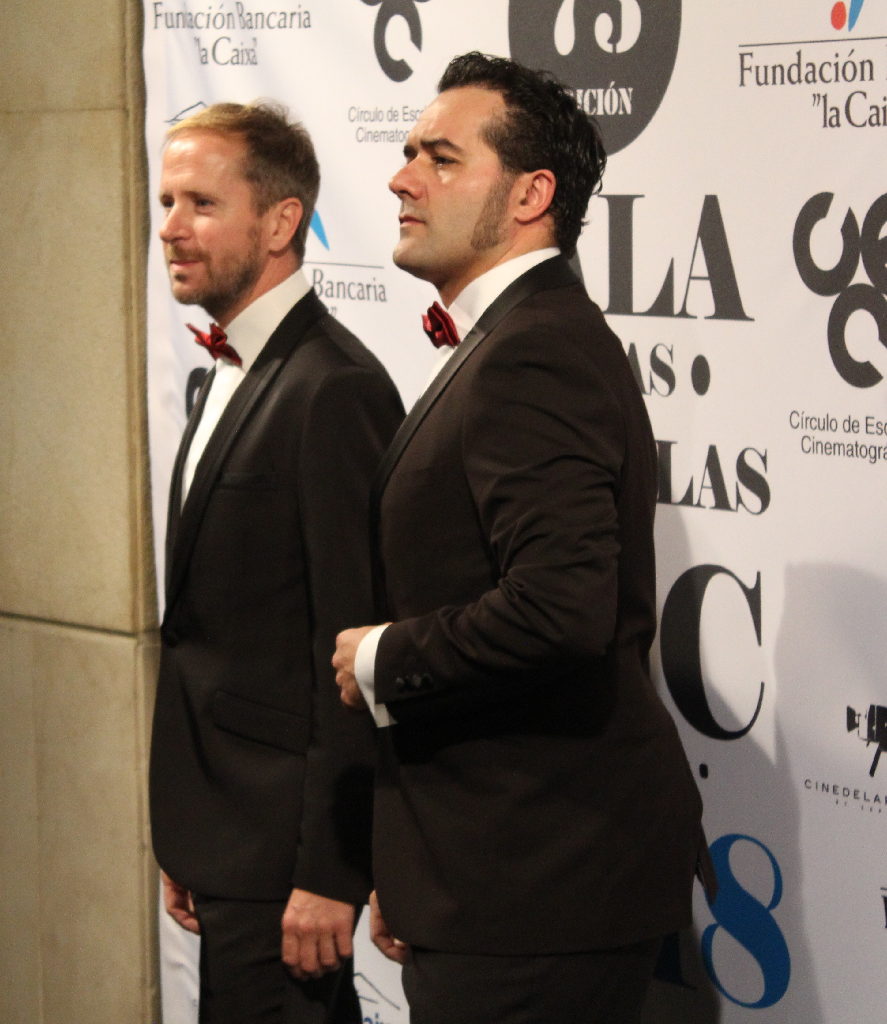 Los actores españoles Alberto López y Alfonso Sánchez, conocidos como Los Compadres, en la 73 edición de las Medallas del Círculo de Escritores Cinematográficos en la que actuaron como presentadores.